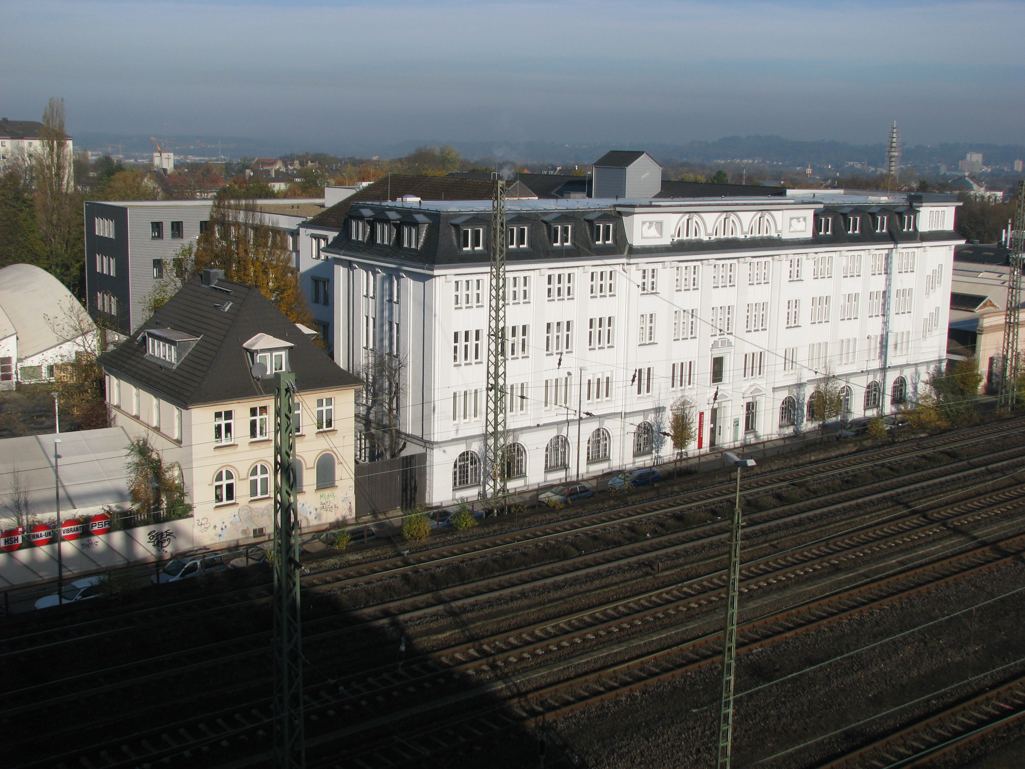 Haus der Integration und Identität, Reichsweg 30, 52068 Aachen. Ehemaliges Verwaltungs- und Produktionsgebäude der Nadelfabrik Rheinnadel. Heute Sitz des Aachener Stadtarchivs und Sitz von 13 weiteren Firmen und Institutionen (Stadtteilbüro Aachen-Ost, Integrationsrat der Stadt Aachen, StadtSportBund, Aachener Wirbelsturm gegen Gewalt, Boxgym, TÜV Nord Bildung, Werkstatt der Kulturen, Sozialraumteam II u.a.). Die Eröffnung nach 5-jährigen Umbau war am 12. April 2013. This is a photograph of an architectural monument.It is on the list of cultural monuments of Aachen